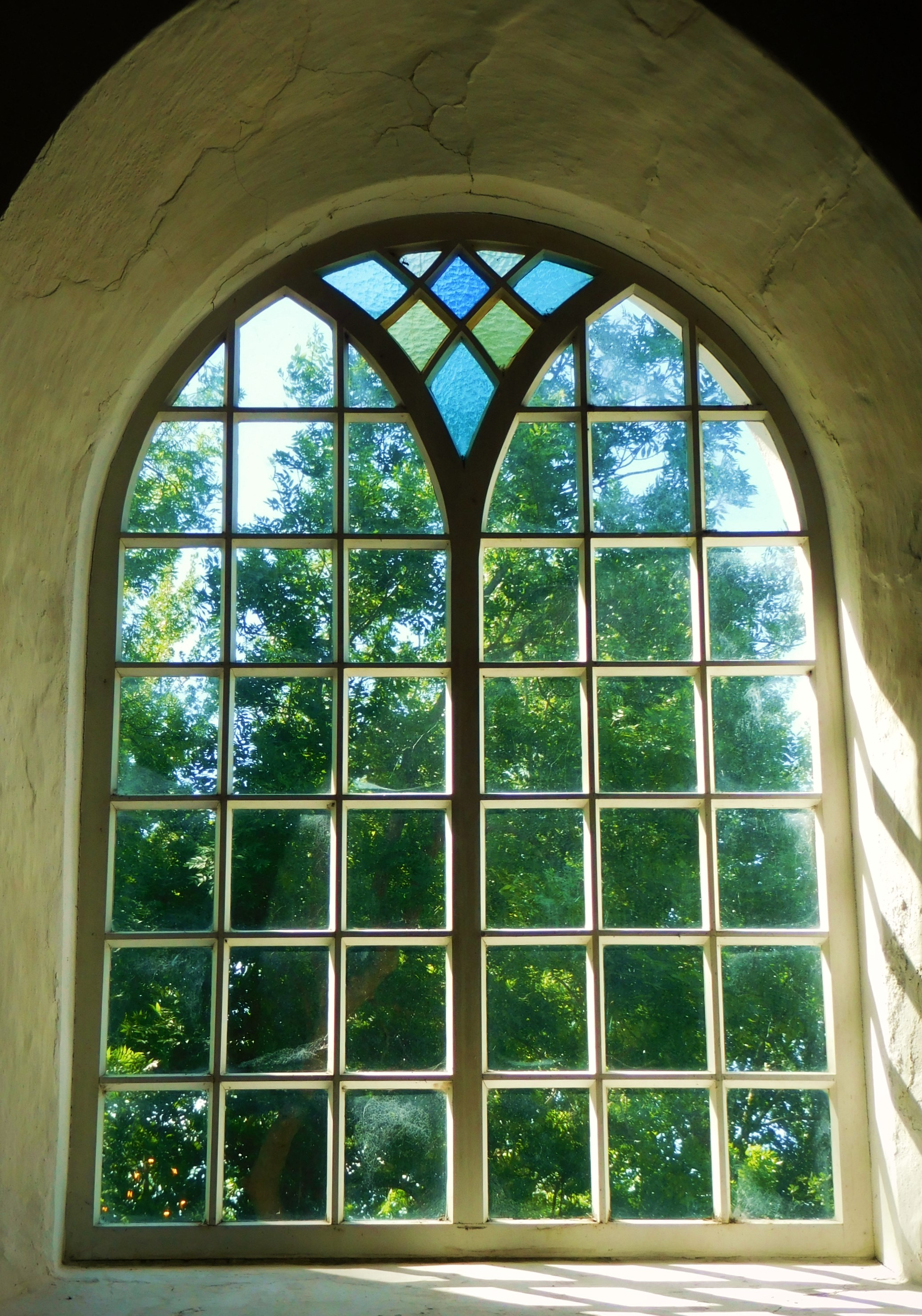 Blick durch das mittlere Kirchenfenster der evangelisch-lutherischen Kirche Wüppels, Gemeinde Wangerland, Niedersachsen, Deutschland